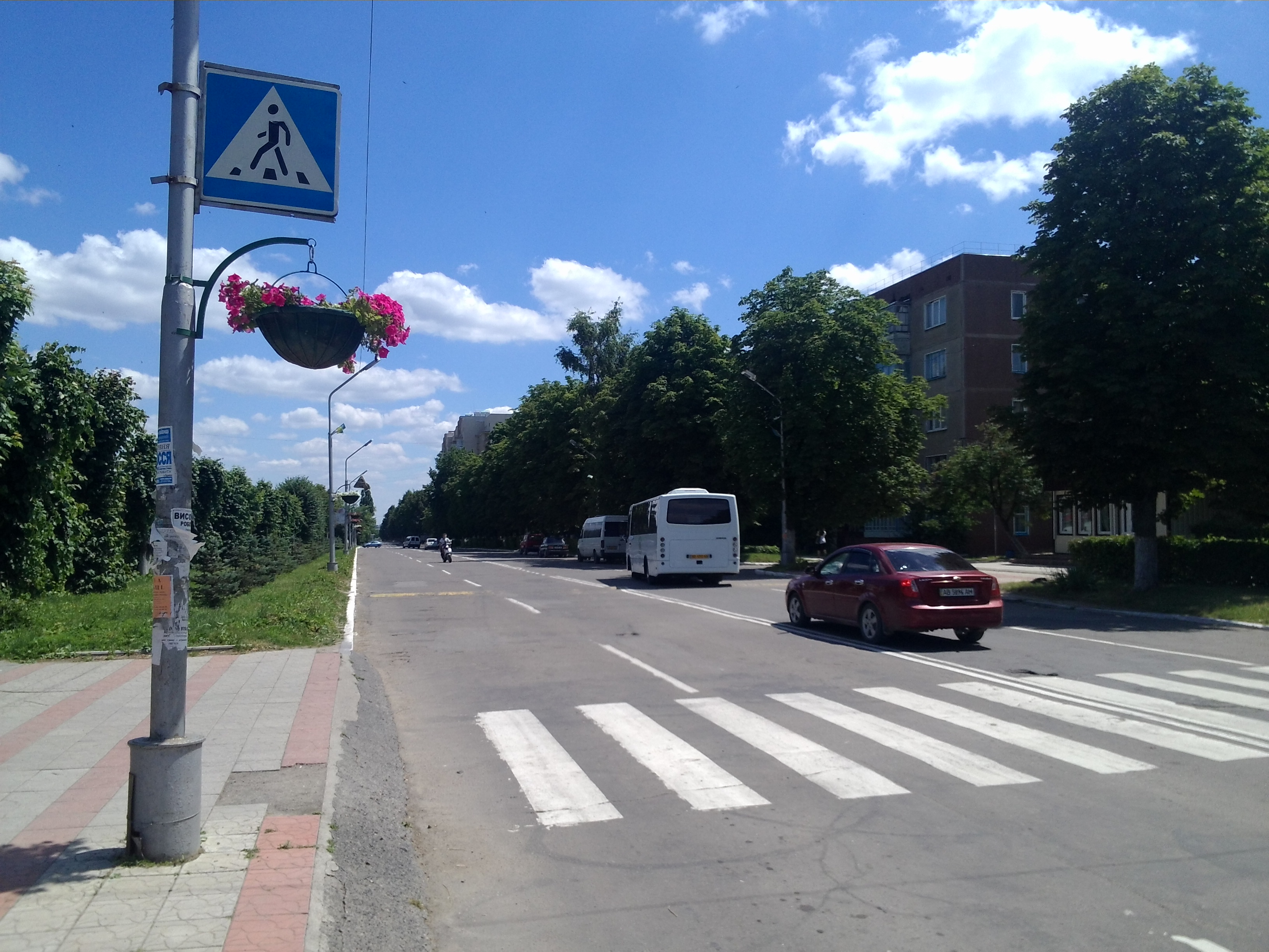 м. Ладижин. Центральна вулиця.